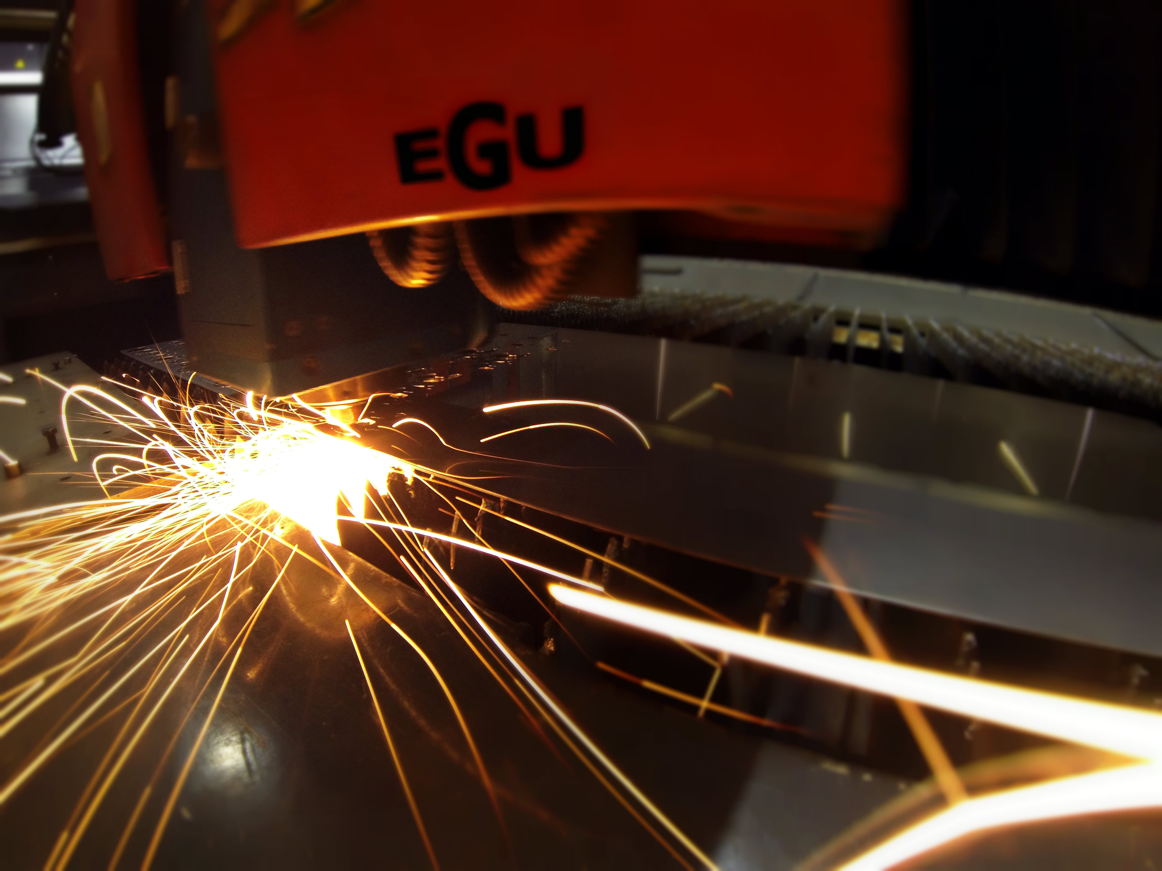 Laserschneiden von 2mm dickem Edelstahlblech (1.4301) mit einem 4KW starken CO2 Industrielaser. Der Schnitt erfolgt im Schmelzschneideverfahren mit Stickstoff als Hilfsgas. Die Schnittgeschwindigkeit beträgt 9000mm/min.